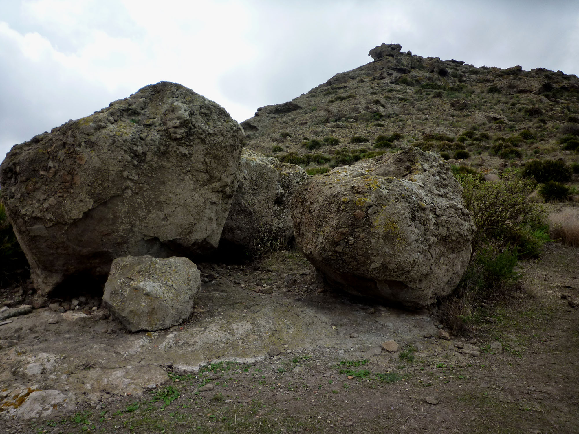 Bombas volcánicas en el monte de El Carmolí en Cartagena (España).